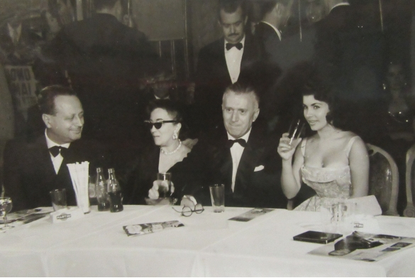 Il tavolo della giuria con Dino Villani (primo da sinistra)